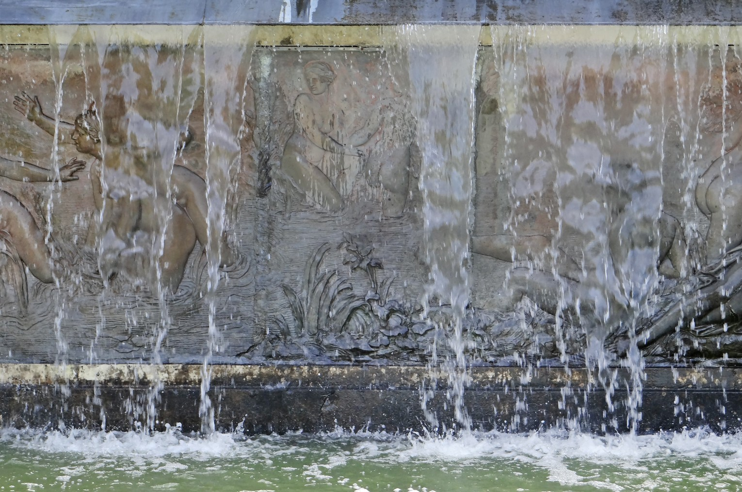 Le bassin des Nymphes (détail) Les Nymphes au bain, bas-relief central de François Girardon, sont voilées par une cascade d'eau. A l'origine, les bas-reliefs étaient dorés. Le bassin a été créé pour utiliser le dénivelé de l'allée d'eau.